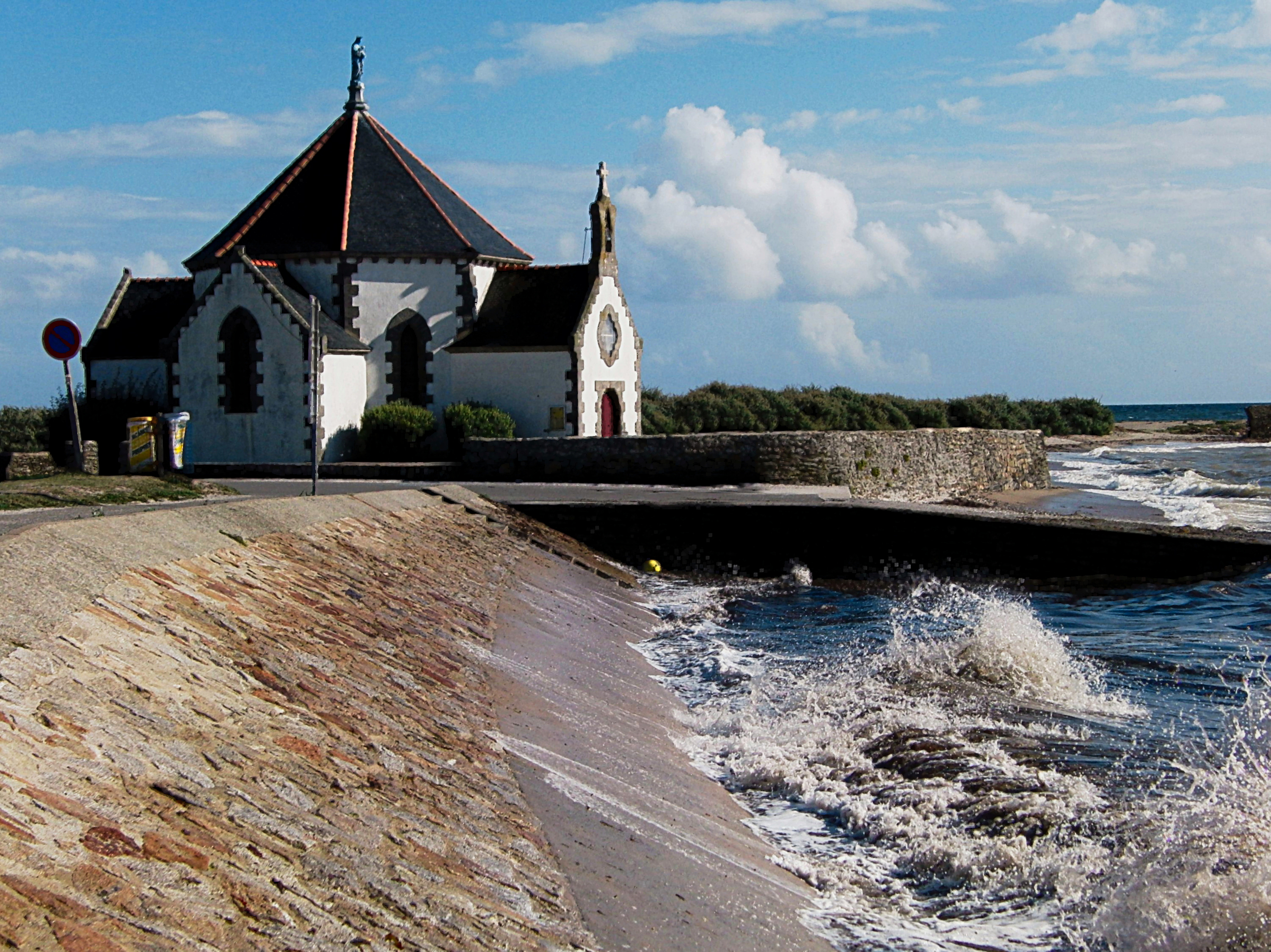 Chapelle Notre-Dame-de-la-Côte (Penvins)Parc naturel régional du Golfe du Morbihan à Golfe du Morbihan